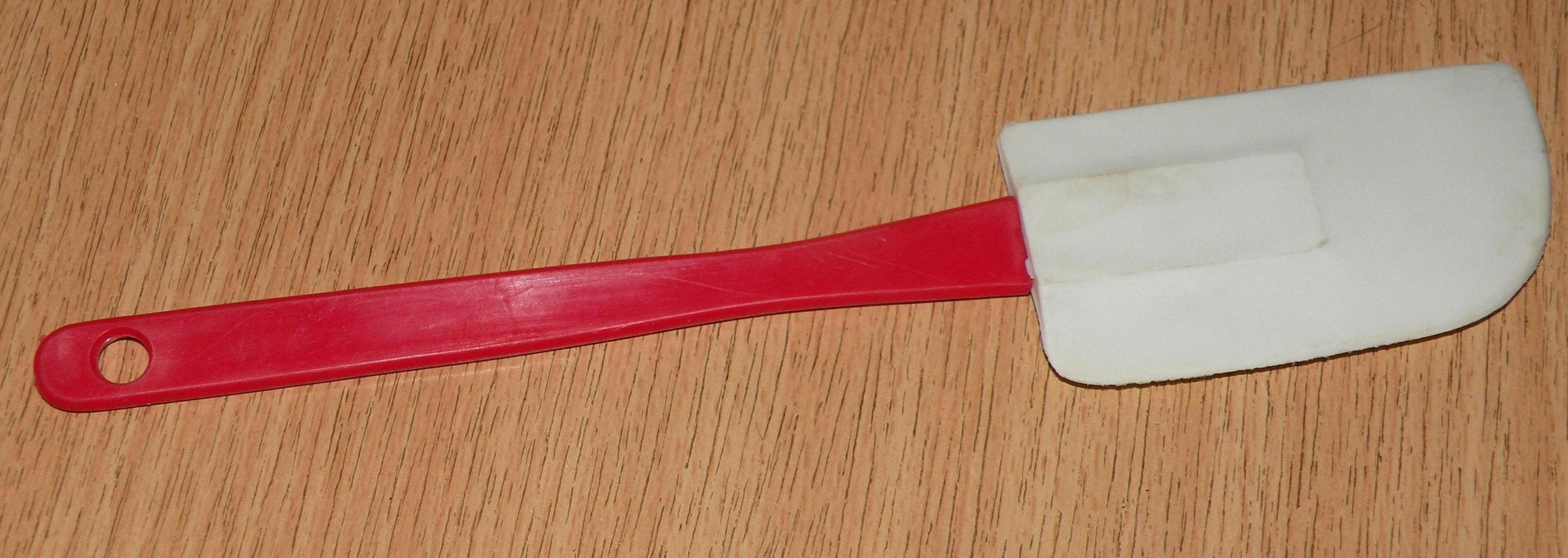 maryse de cuisine, spatule souple